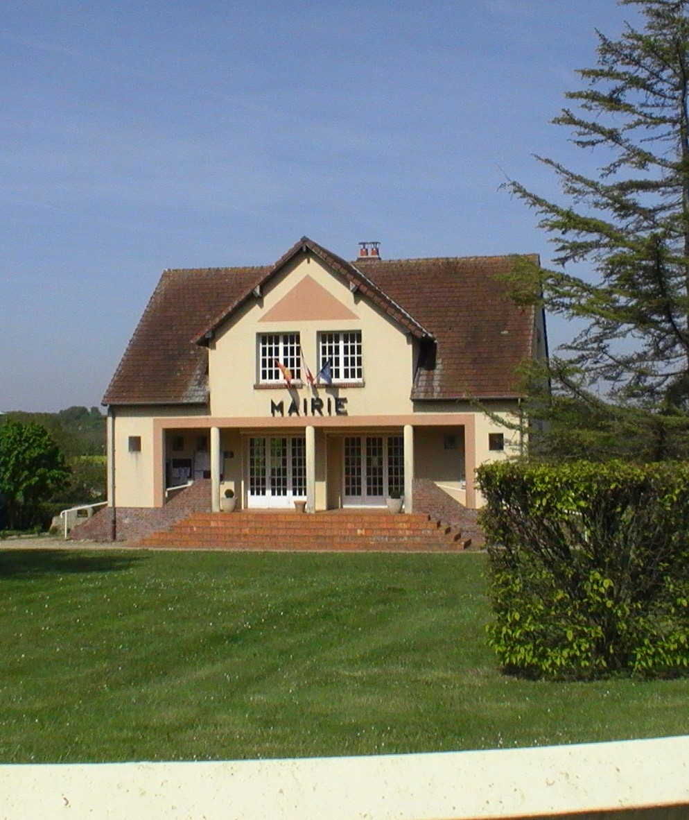 La mairie en avril 2017.